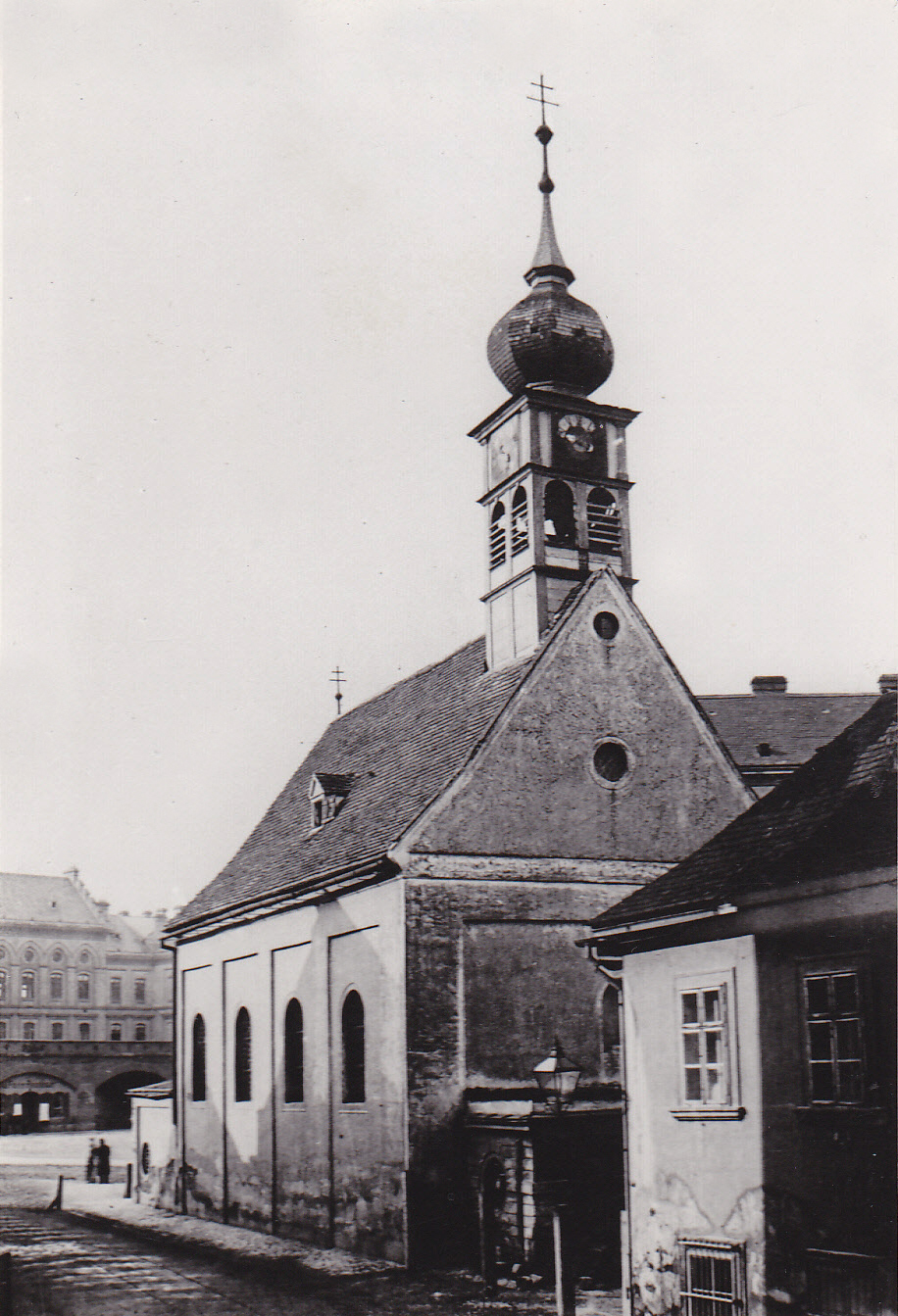 ehem. Margarethenkirche am Radetzkyplatz (Bild um 1876 - vor Abbruch)